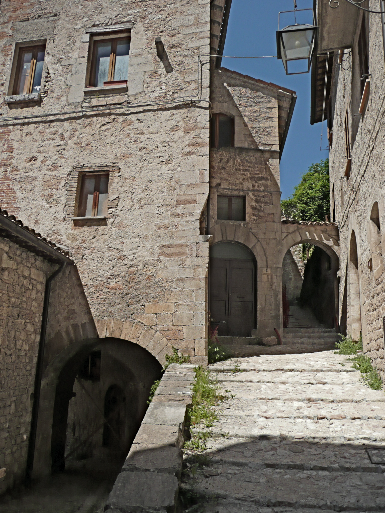 Visso, centro storico